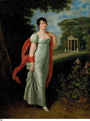 Teresa Pickler, olio su tela, Collezione privata